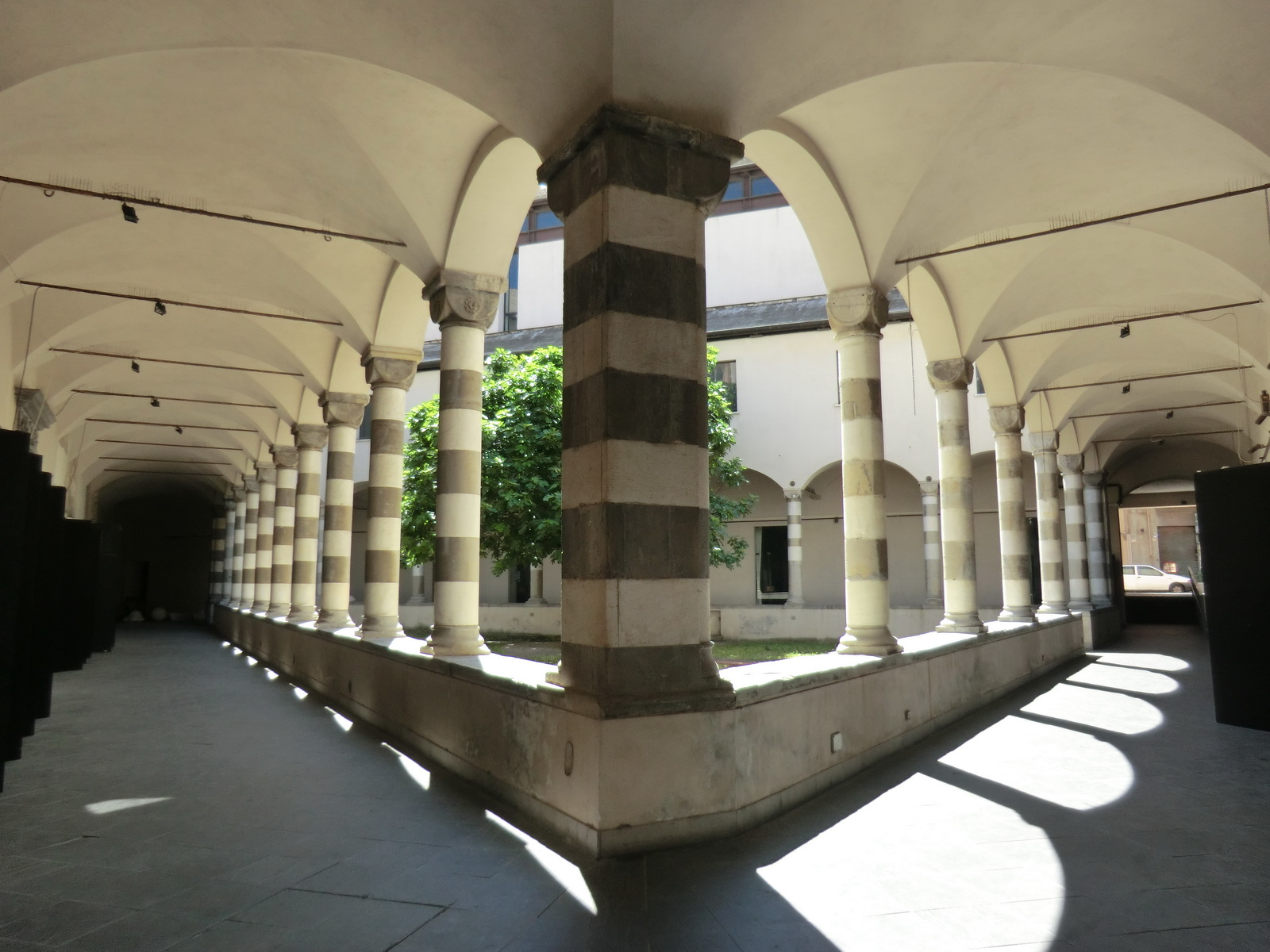 Chiesa di Sant'Agostino, Genoa, Italy